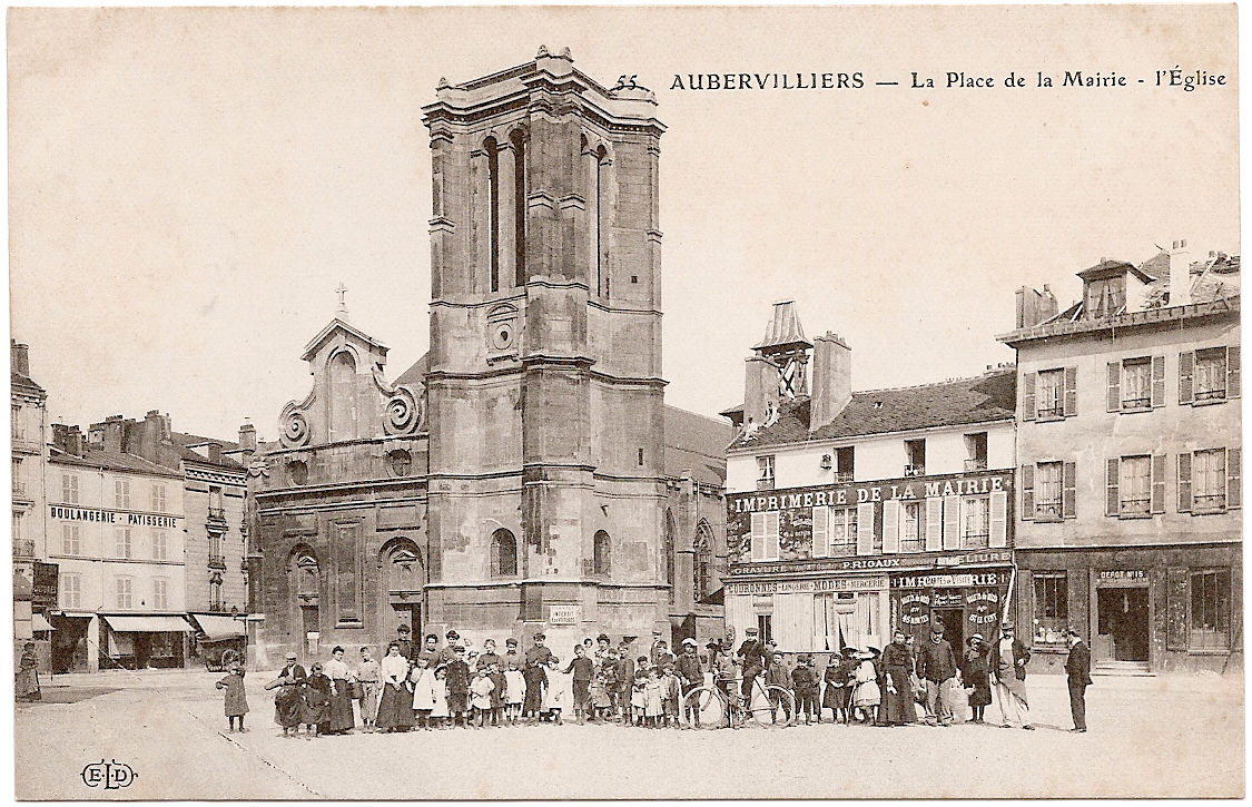 Place de la Mairie avec l'église. Aubervilliers.